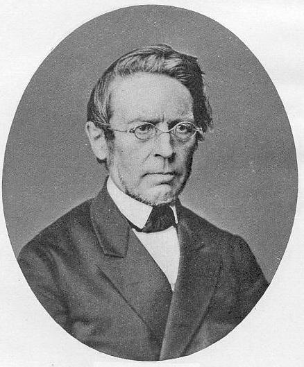 Johann Gustav Droysen (1808–1884), deutscher Althistoriker. Originalfotografie im Besitz von Dr. Gustav Droysen, Düben